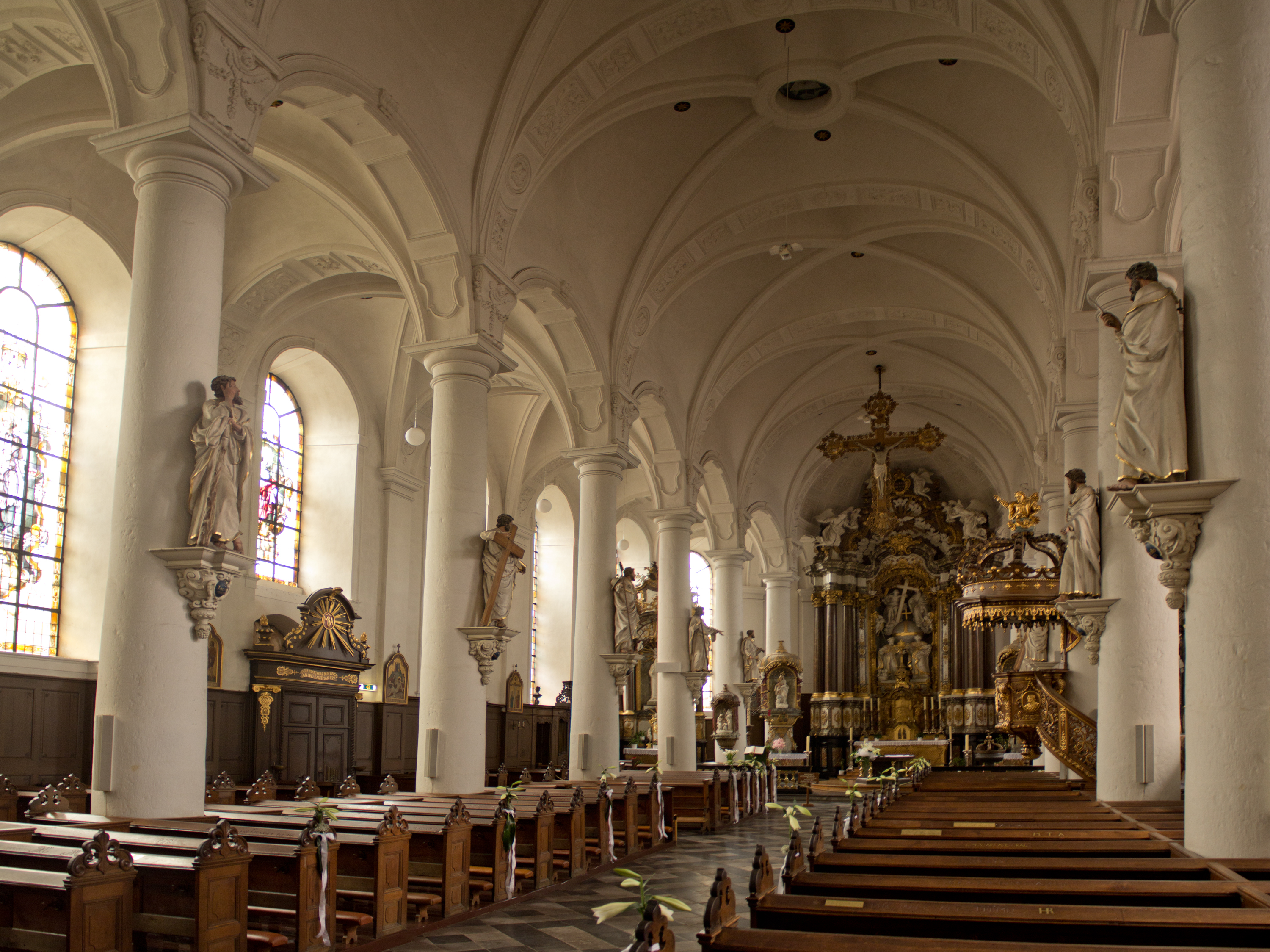 St. Nikolaus Kirche, Eupen